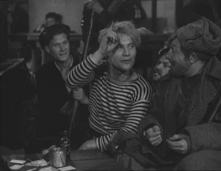 Марк Бернес в роли Кости Жигилева в к/ф "Человек с пужьём"